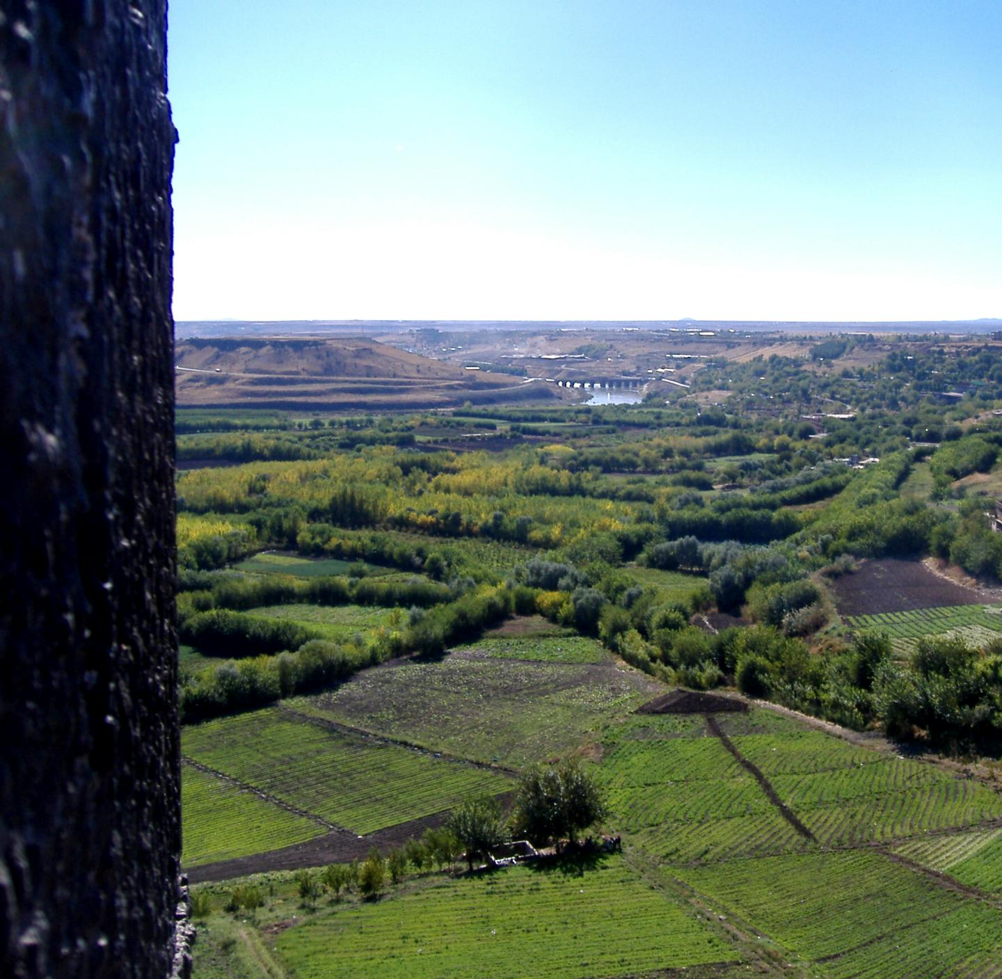 Il fiume Tigri visto dalle mura di Diyarbakır (Turchia) - L'inizio della "Mezzaluna Fertile".